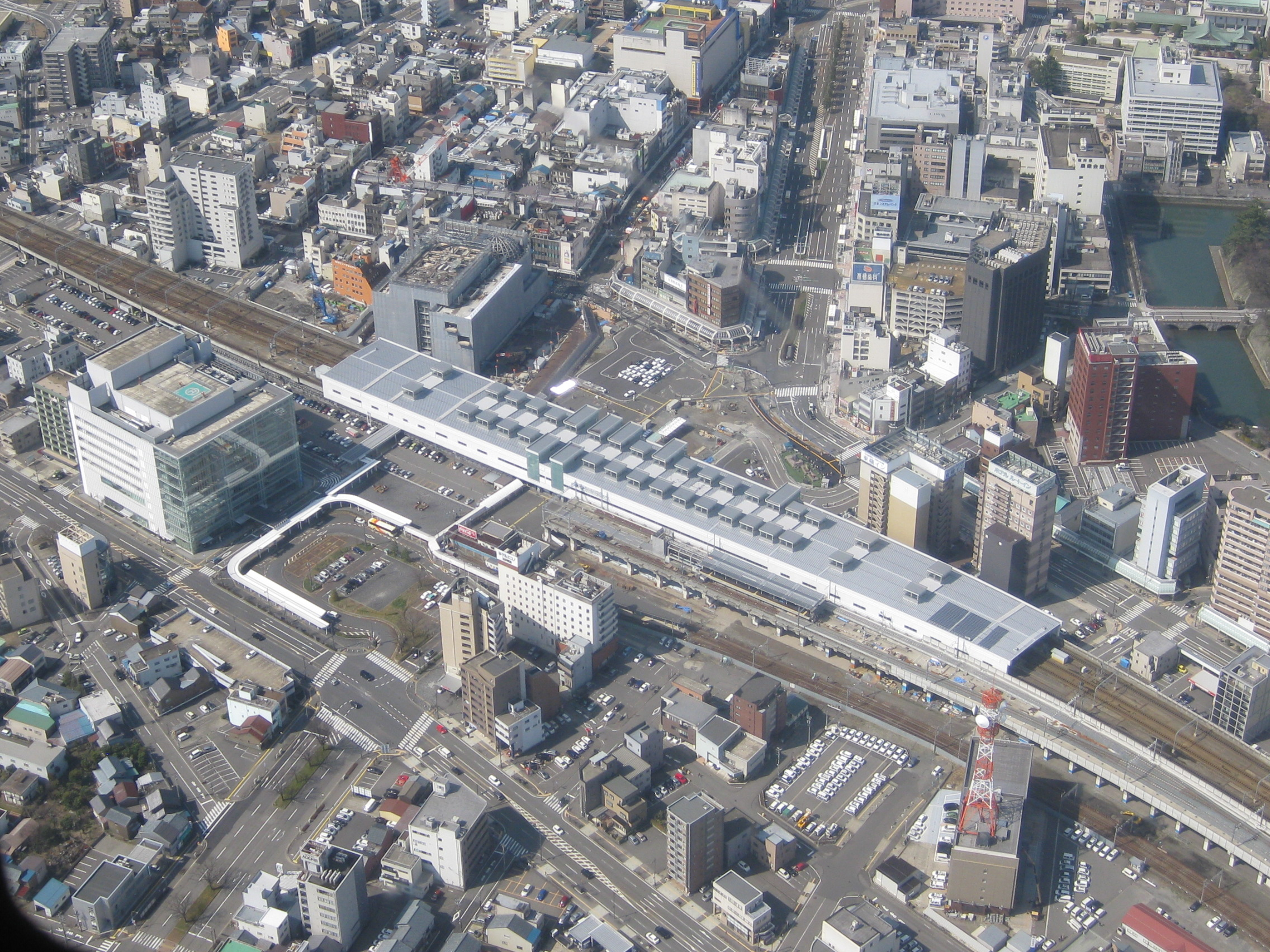 上空から撮影した福井駅